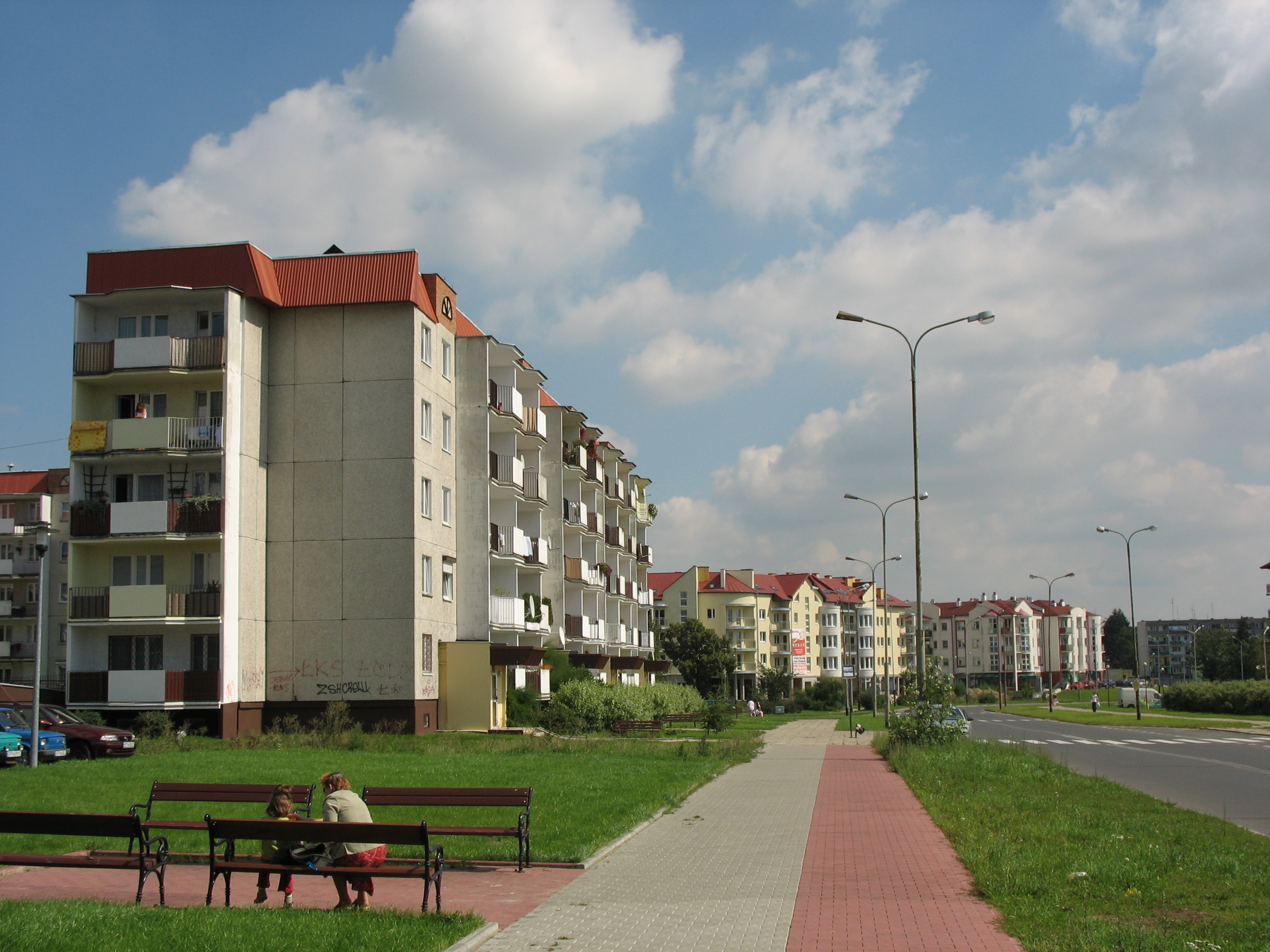 Pabianice - Osiedle Bugaj